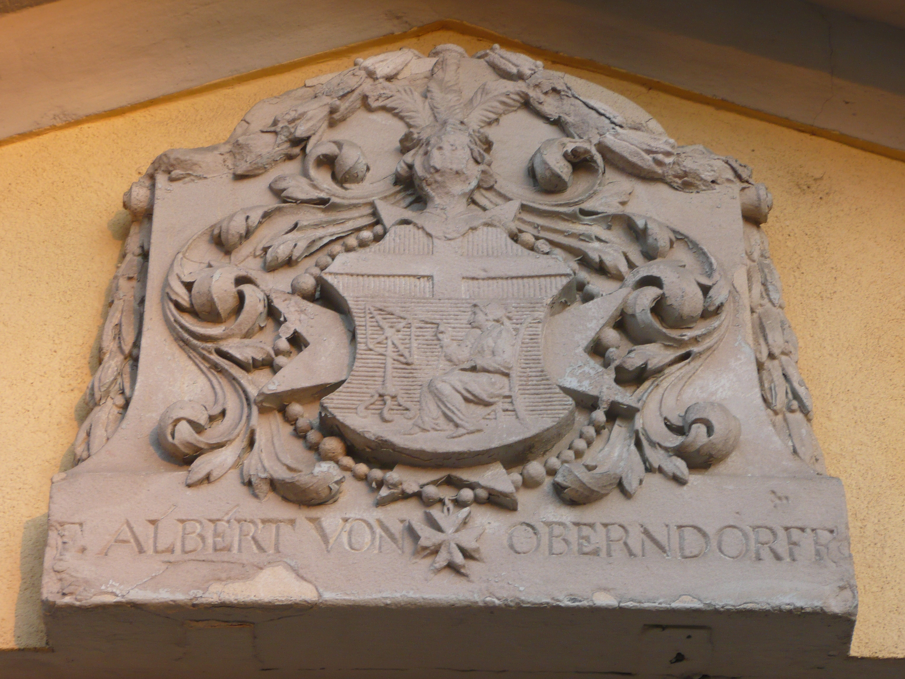 Wappen Albert von Oberndorff, angebracht am Schloss Neckarhausen (Ortsteil Edingen-Neckarhausen, Baden-Württemberg, Deutschland)